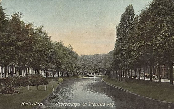 De Westersingel (deel van het Waterproject) en de Mauritsweg. Afbeelding van prentbriefkaart uit 1904, fotograaf onbekend